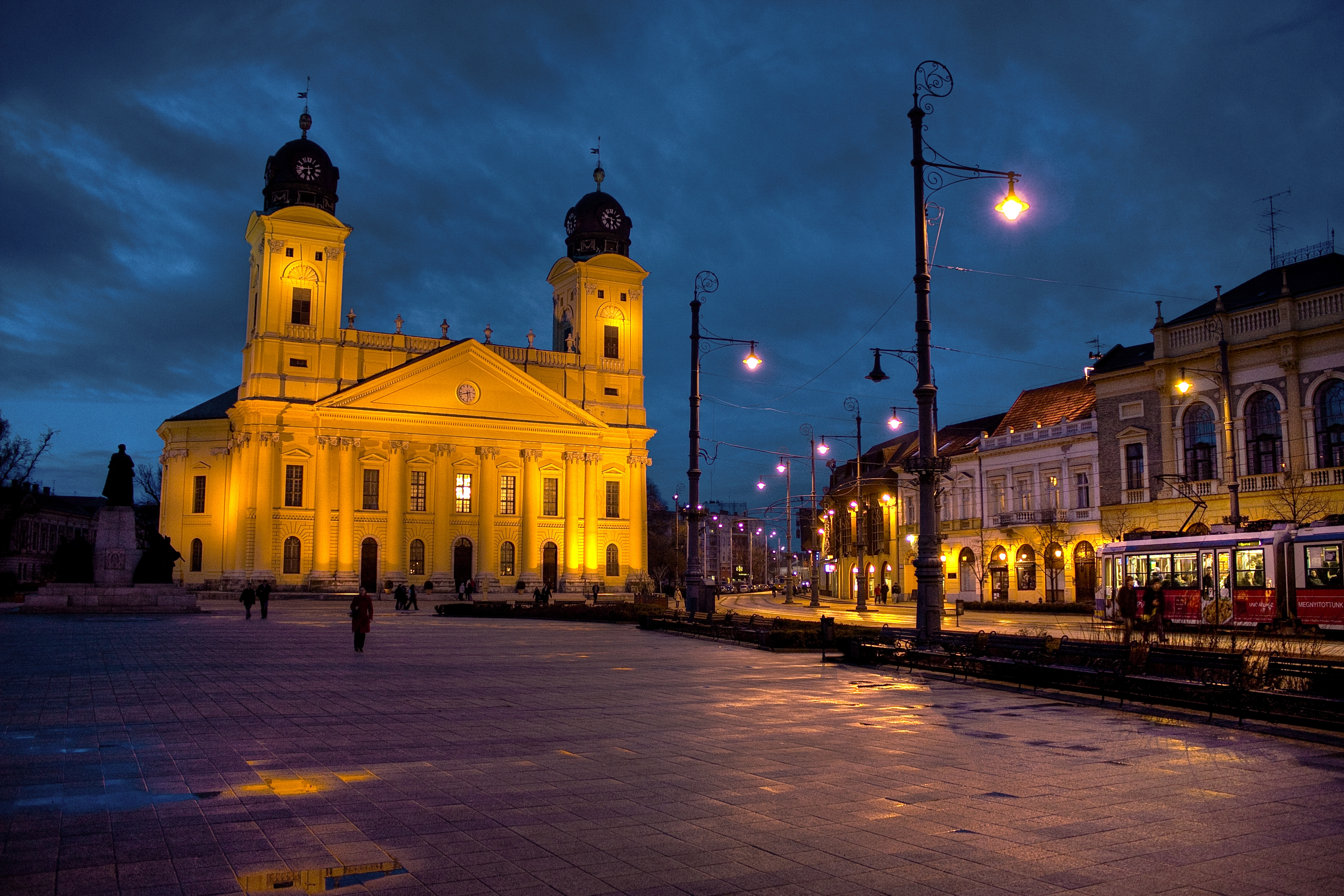 Ref. Nagytemplom (Debrecen, Kálvin tér) This is a photo of a monument in Hungary. Identifier: 5233